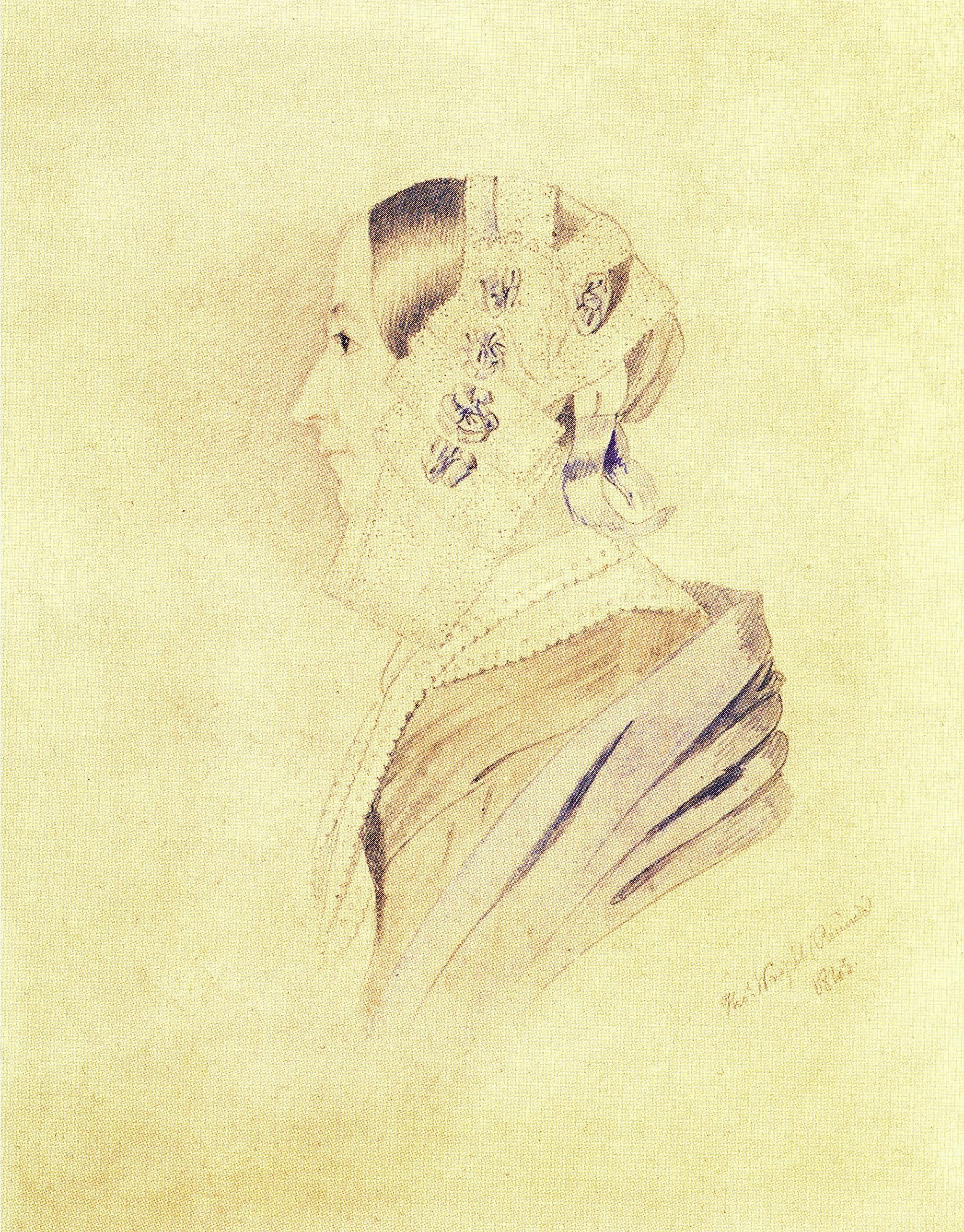 Баронесса Лидия Григорьевна Розен (1817-1866), в замужестве Дадиани. Портрет находится в собрании Государственного музея А.С. Пушкина (Москва). Номер в Госкаталоге: 10117323.